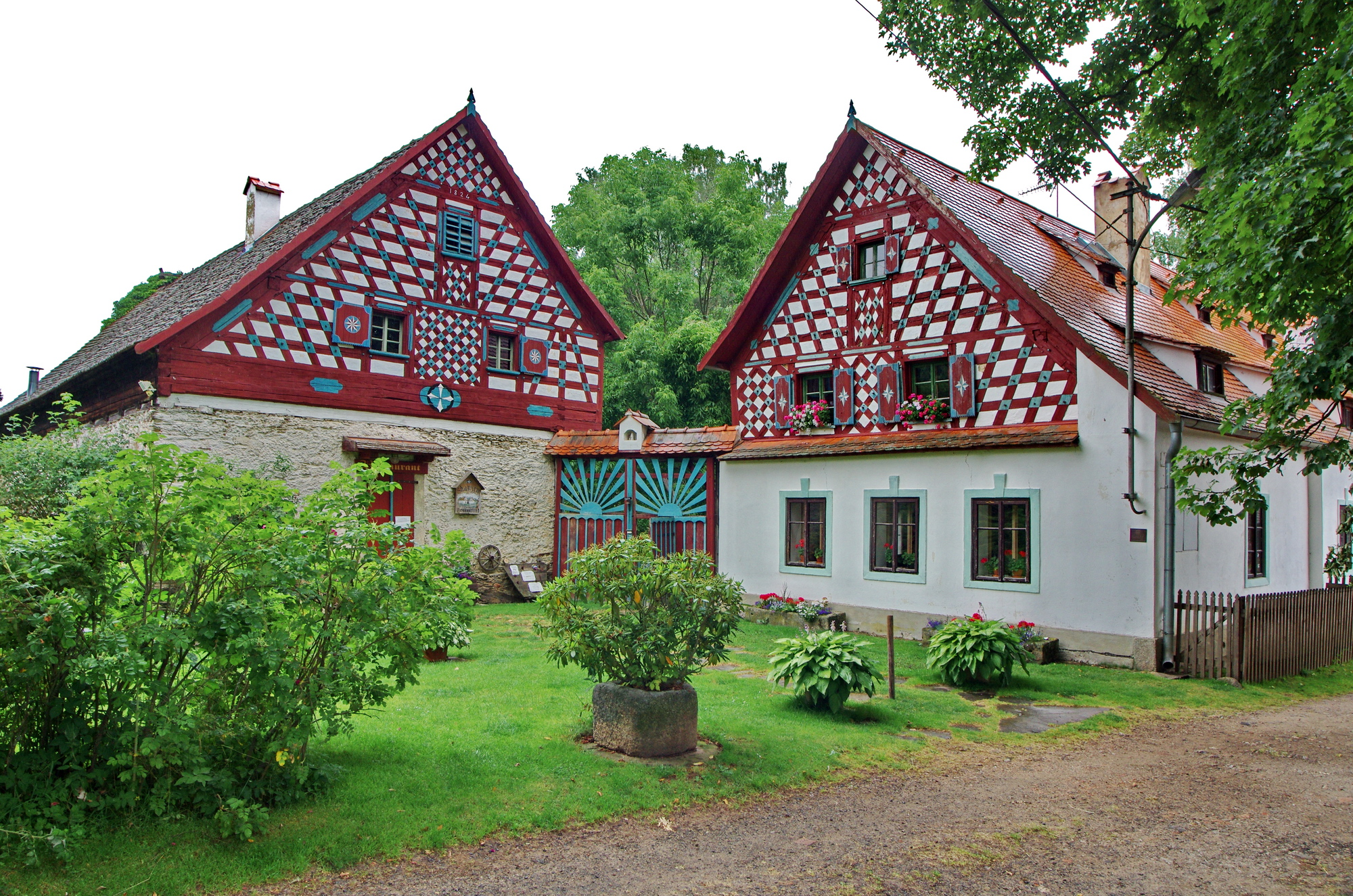 Rustlerův statek, Doubrava (část obce Lipová), okres Cheb